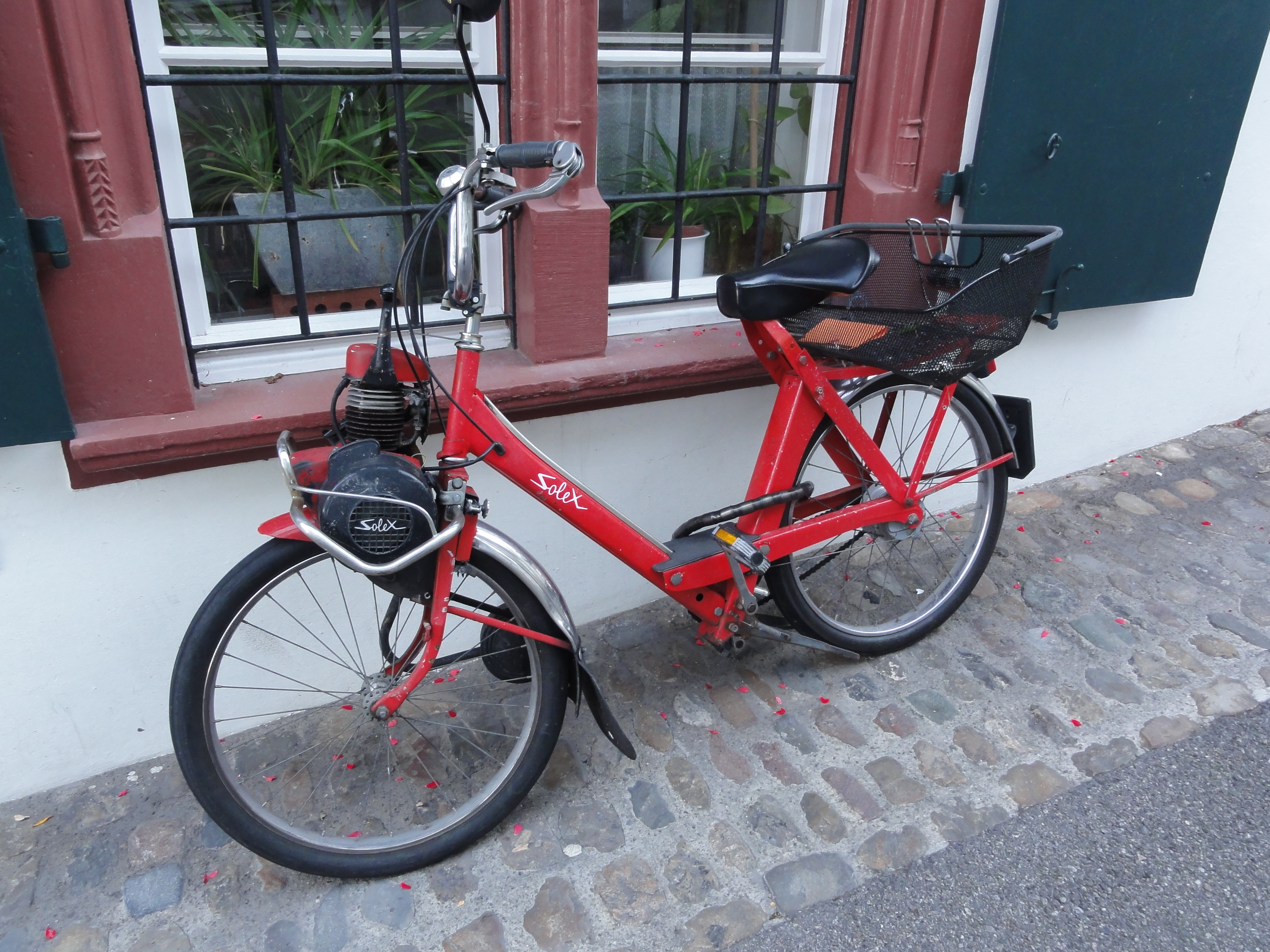 Basel — Solex S3800-Leichtmofa